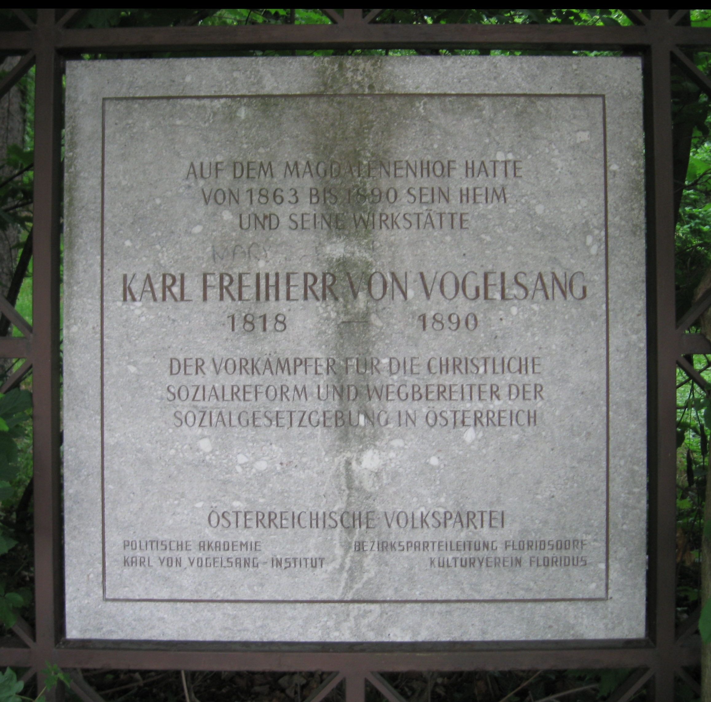 Gedenktafel für Karl von Vogelsang an der Villa Magdalenhof Wien 21., Senderstraße 130.